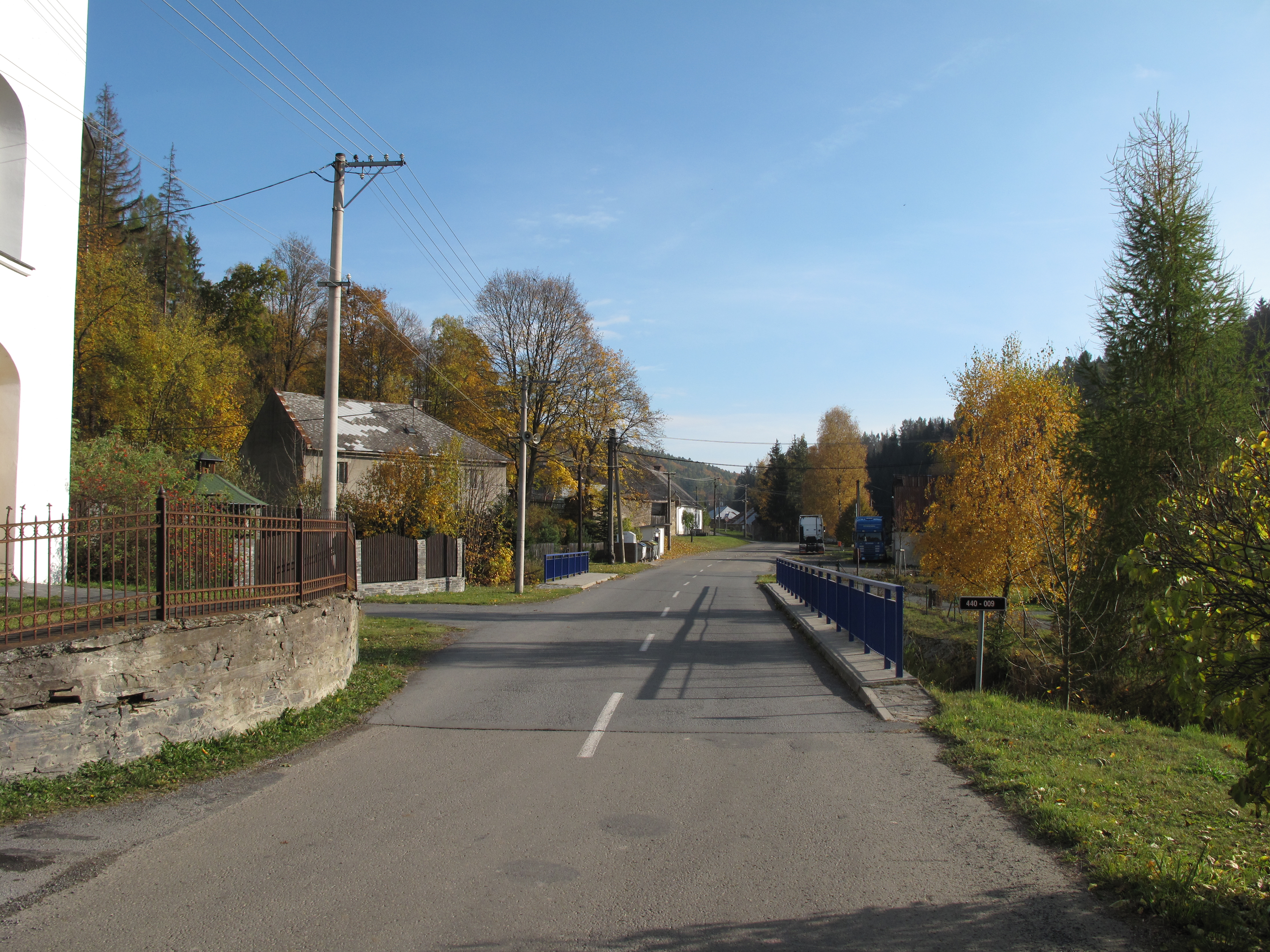 Norberčany. Okres Olomouc, Česká republika.